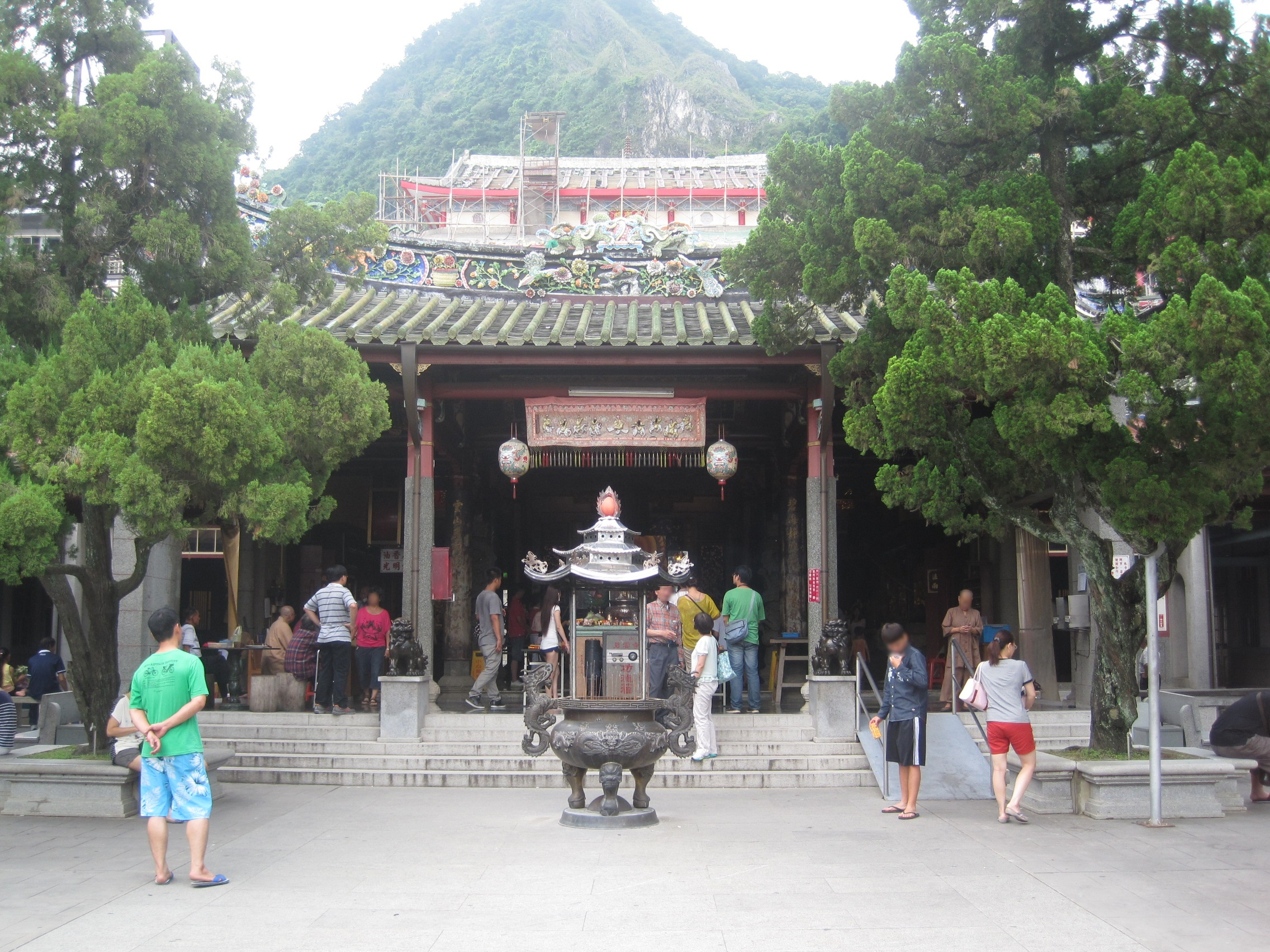 火山碧雲寺正殿